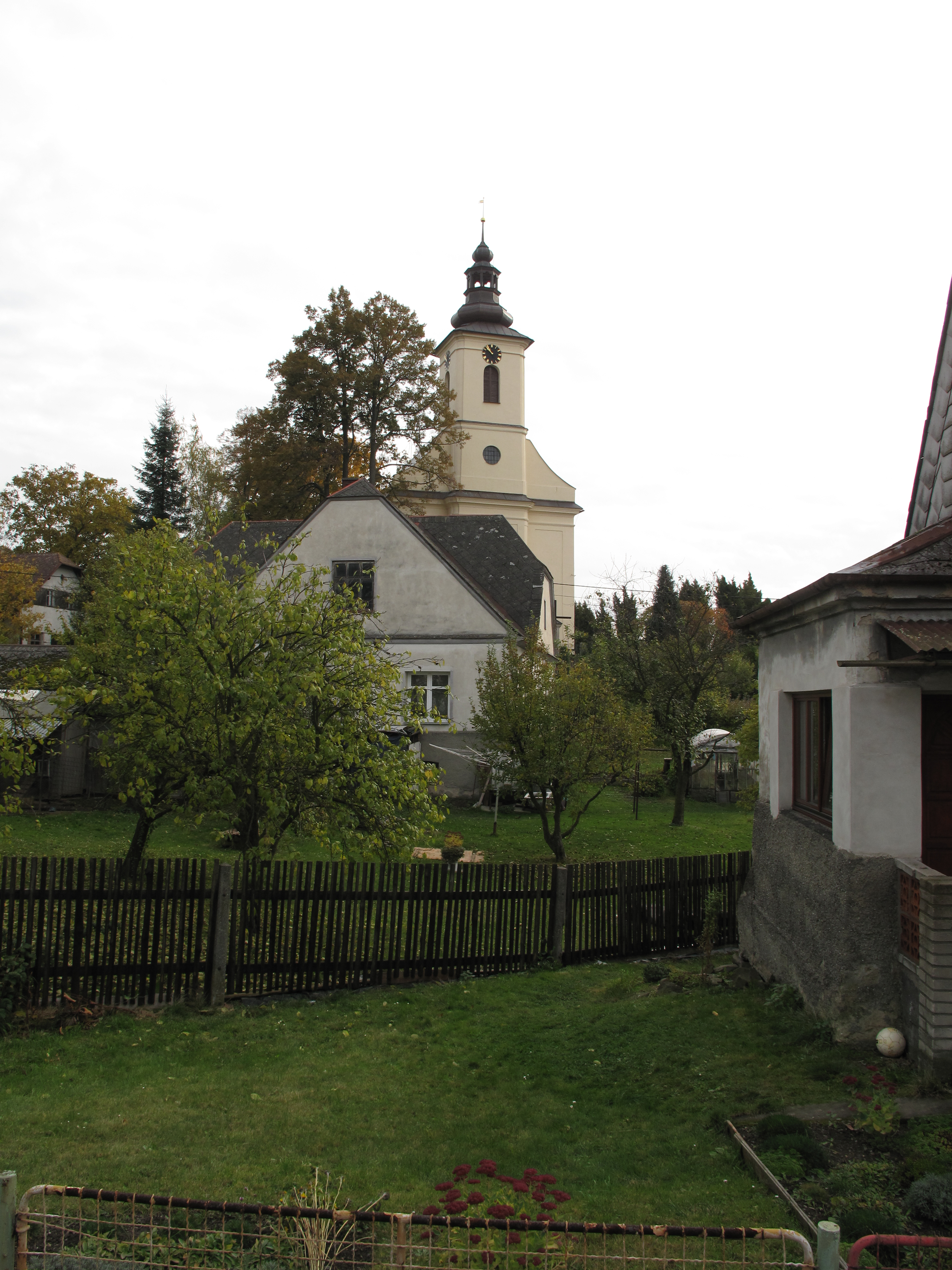 Nové Lublice. Okres Opava, Česká republika.